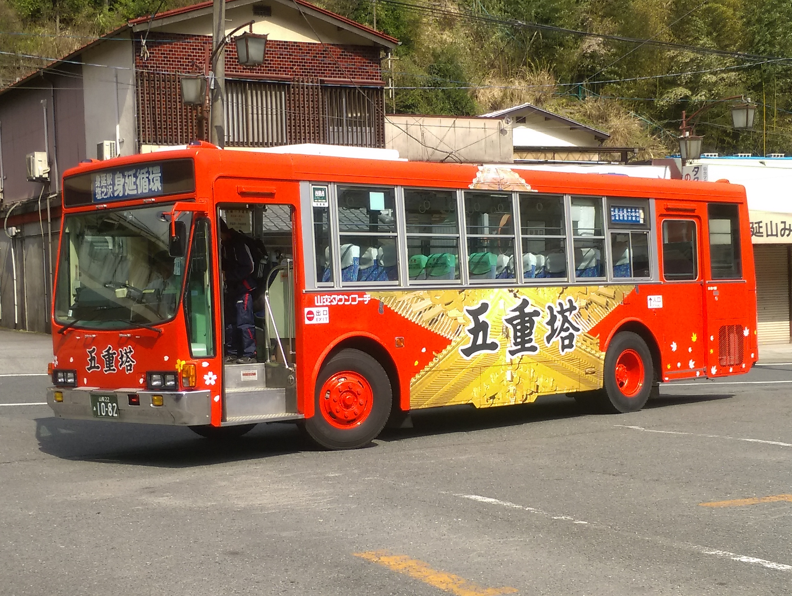 山交タウンコーチ身延営業所の一般路線バス車両。 五重塔のラッピングが施されている。